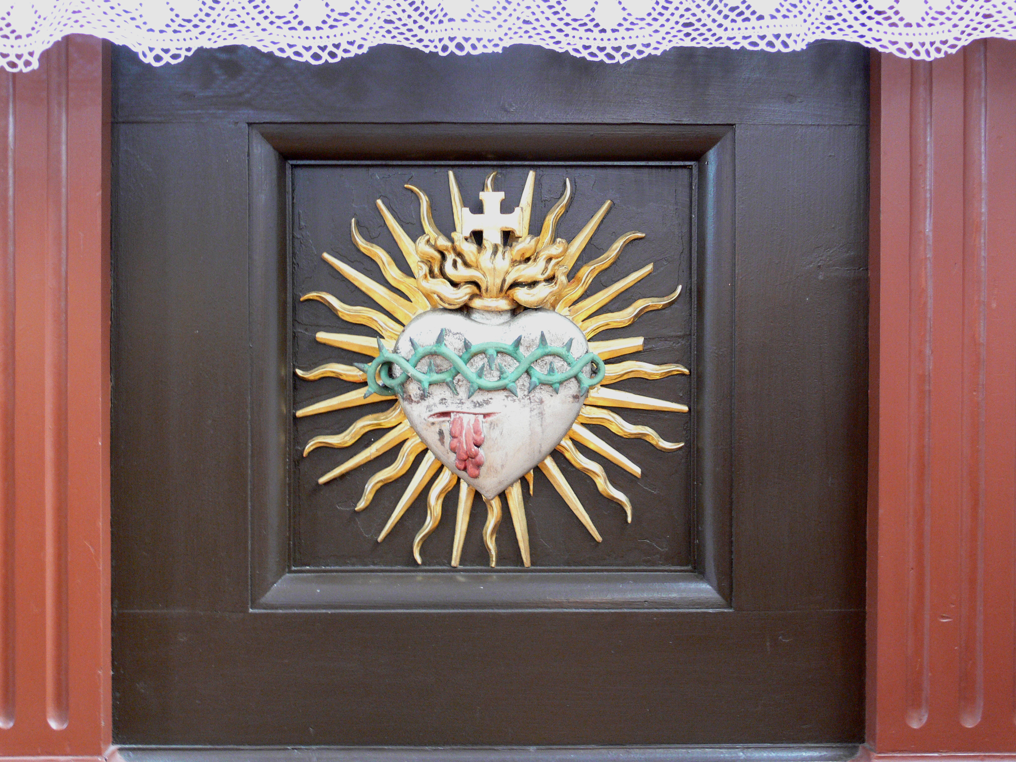 Filialkirche zur Schmerzhaften Muttergottes, Alberskirch, Ortschaft Taldorf, Stadt Ravensburg Rechter Seitenaltar: Relief „Herz Jesu“ auf dem Unterbau